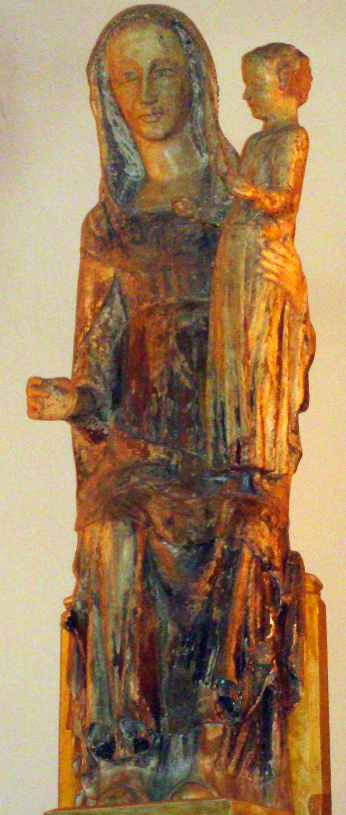 Statua della Vergine chiesa di Origlio.